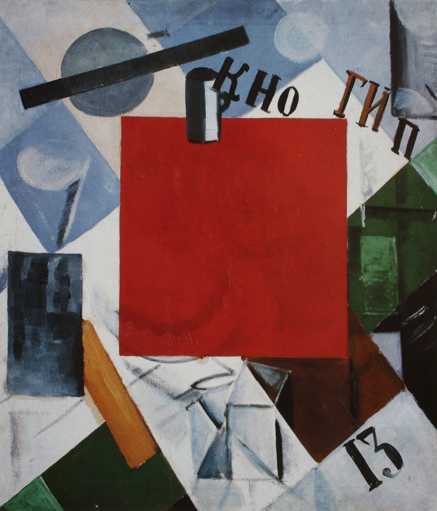 Алексей Моргунов. Композиция № 1. Около 1915. Холст, масло. 71х62.